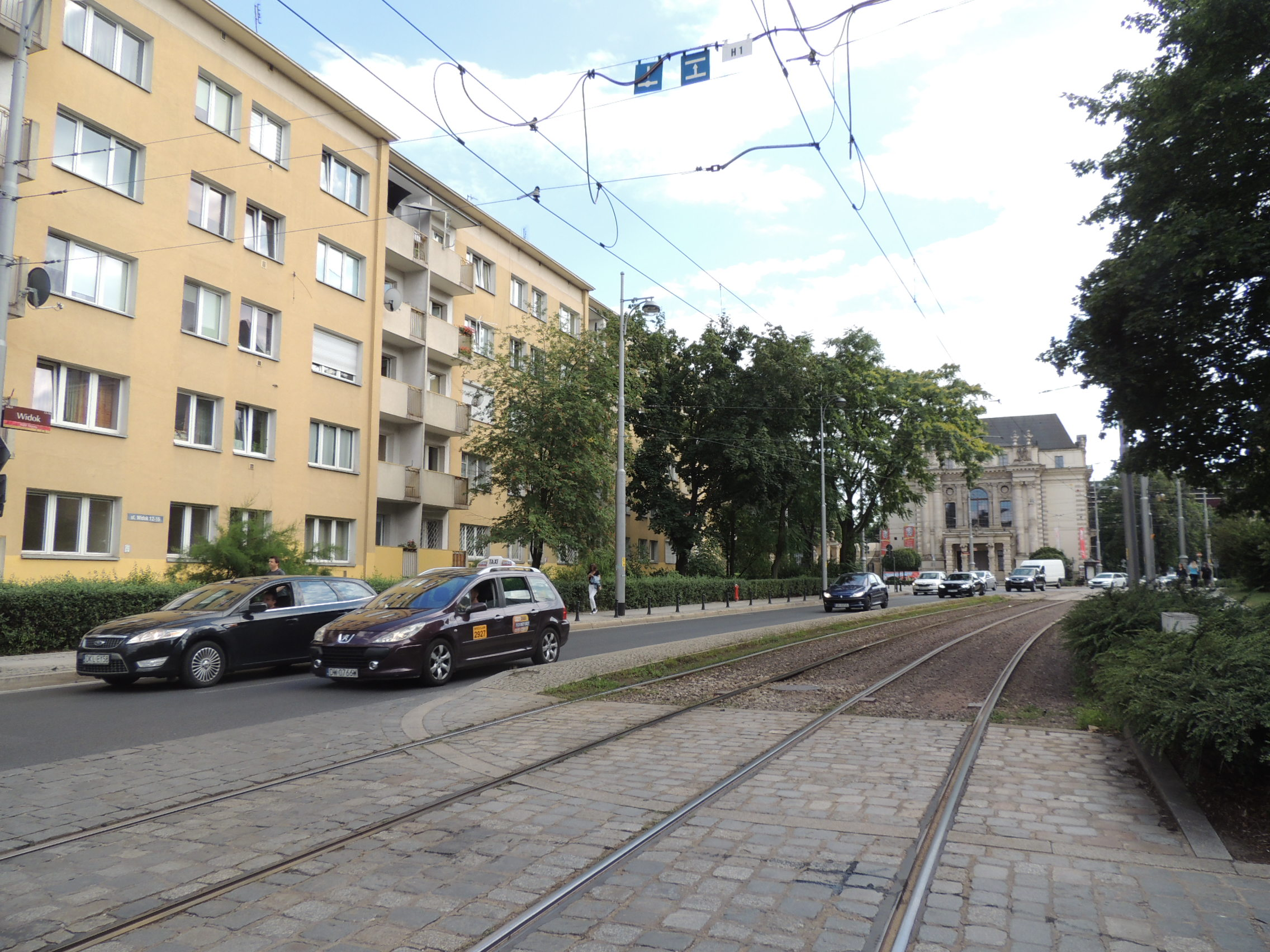 Ulica Widok we Wrocławiu